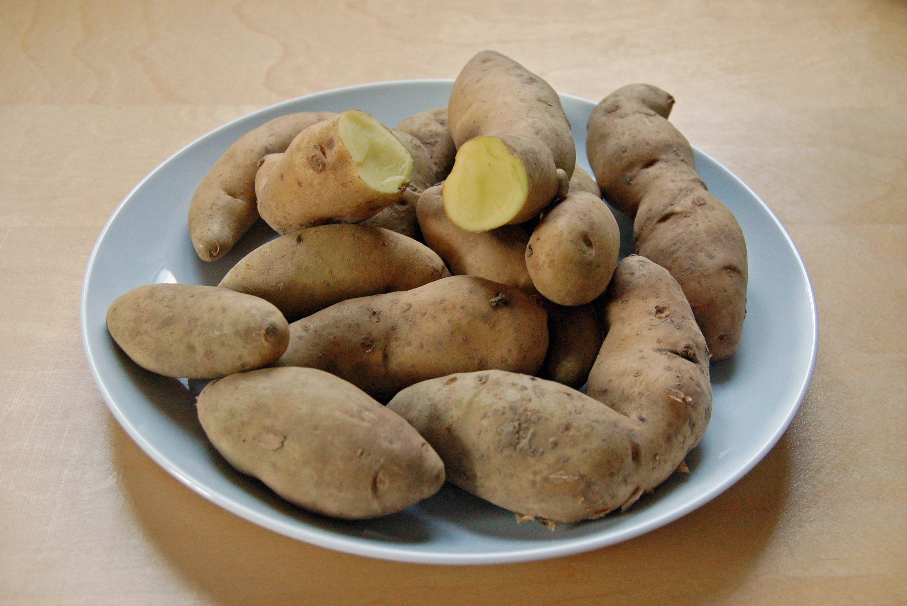 Description: Bamberger Hörnle, festkochende Kartoffelsorte Source: selbst fotografiert, Dezember 2005 Photographer: Alice Wiegand, (Lyzzy)